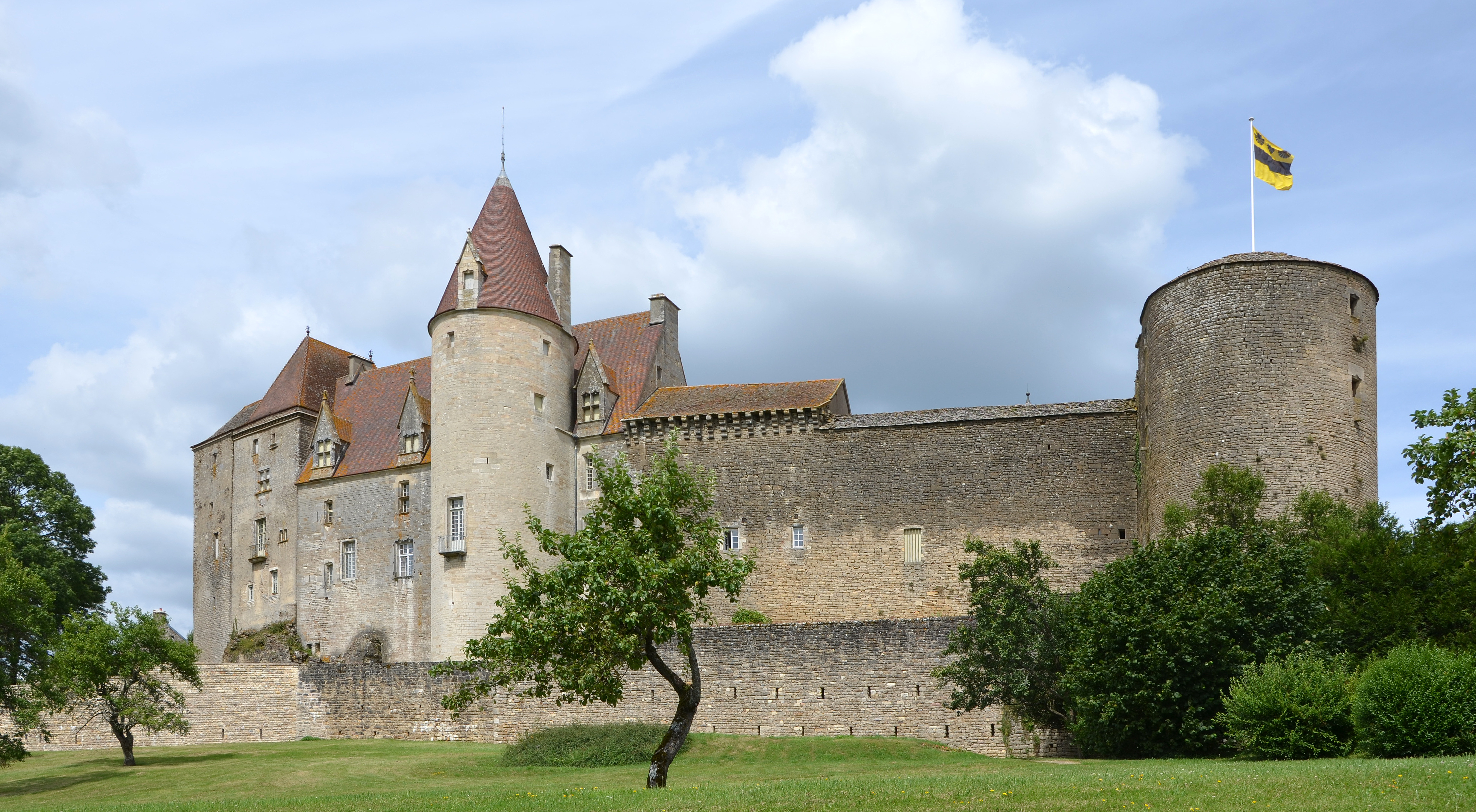 Château de Châteauneuf , Côte-d'Or, Bourgogne, France